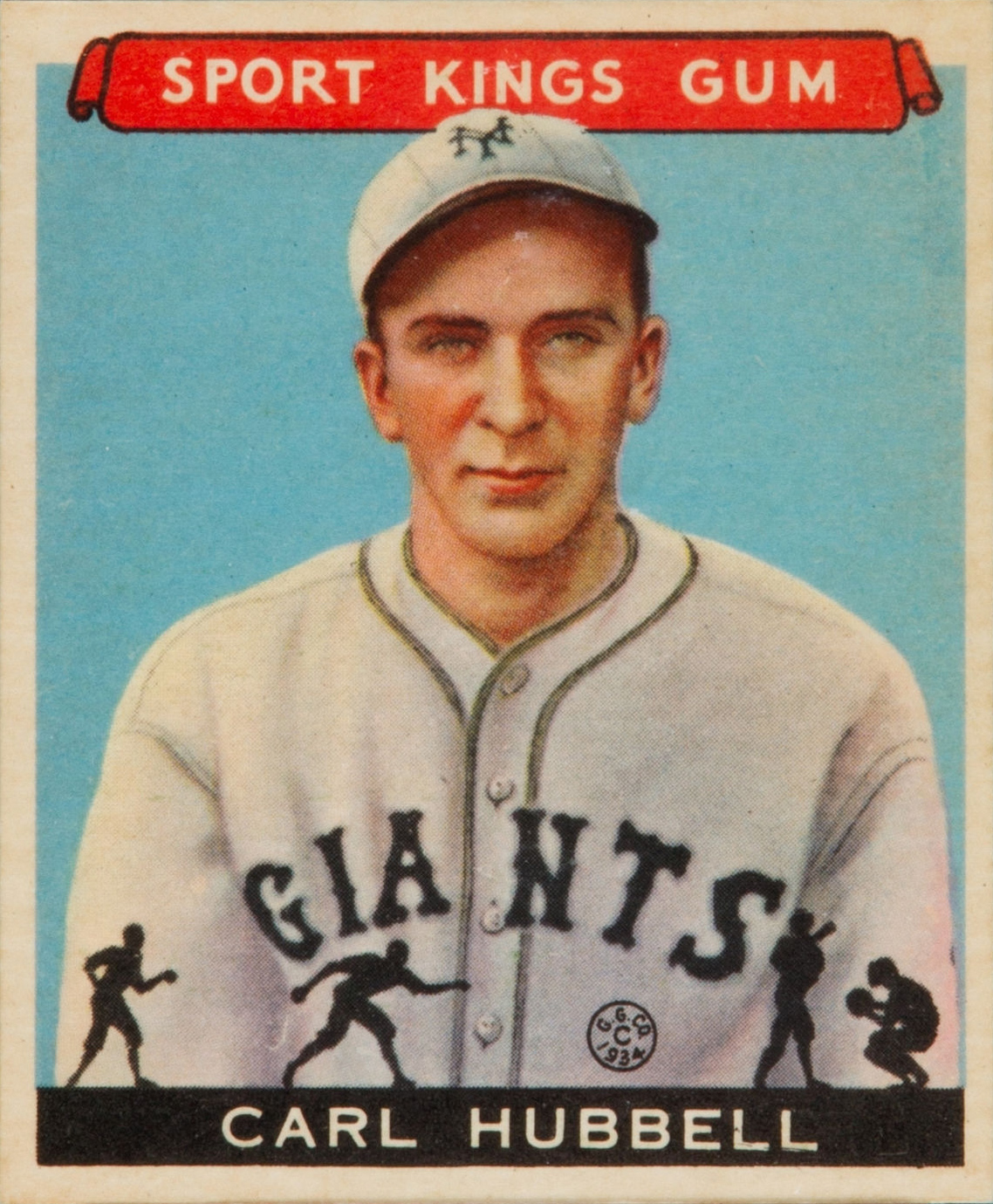 1933 Sport Kings Carl Hubbell #42